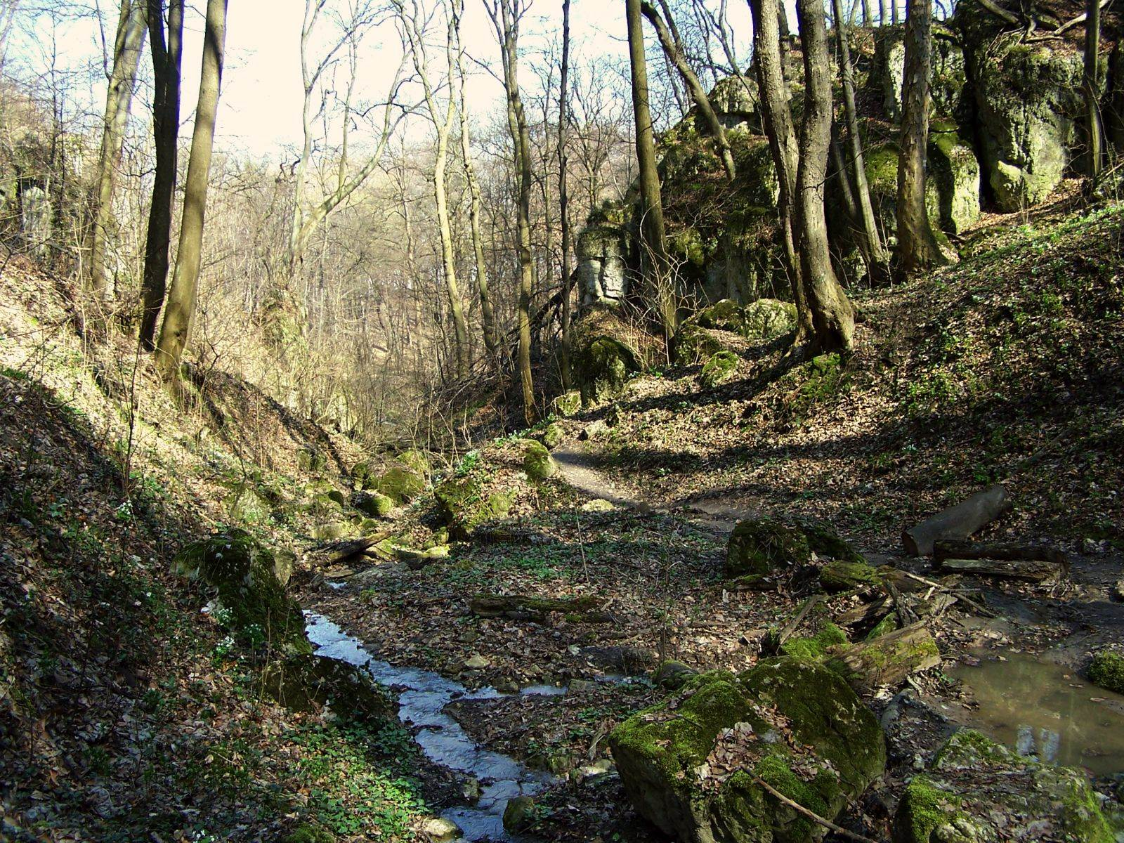 Nature reserve Panieńskie Skały (Kraków, Las Wolski)